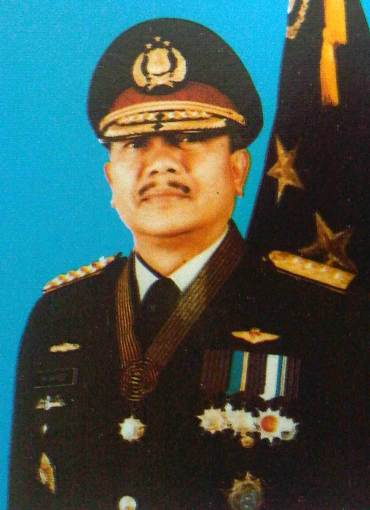 Jenderal Polisi Mochammad Sanoesi